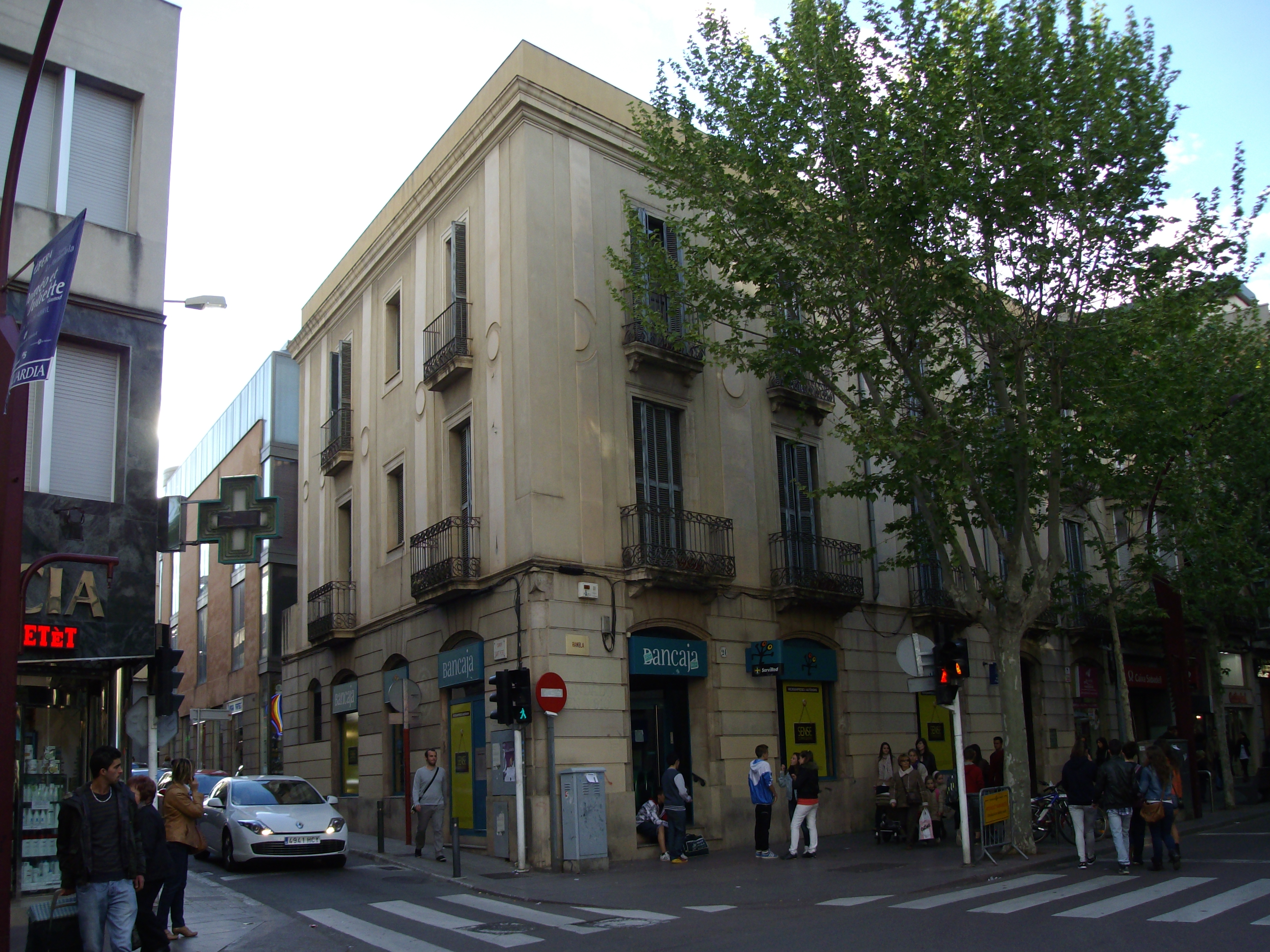 Edificio construido por Juli Batllevell en 1901, situado en la Rambla, 22-24, de Sabadell, Barcelona (España). El edificio dejó de utilizarse como hotel en 1933, posteriormente ha recibido diferentes usos.